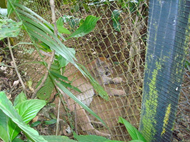 Puma concolor costaricensis, comúnmente puma o león de montaña, en el Zooave, La Garita de Alajuela, Costa Rica.